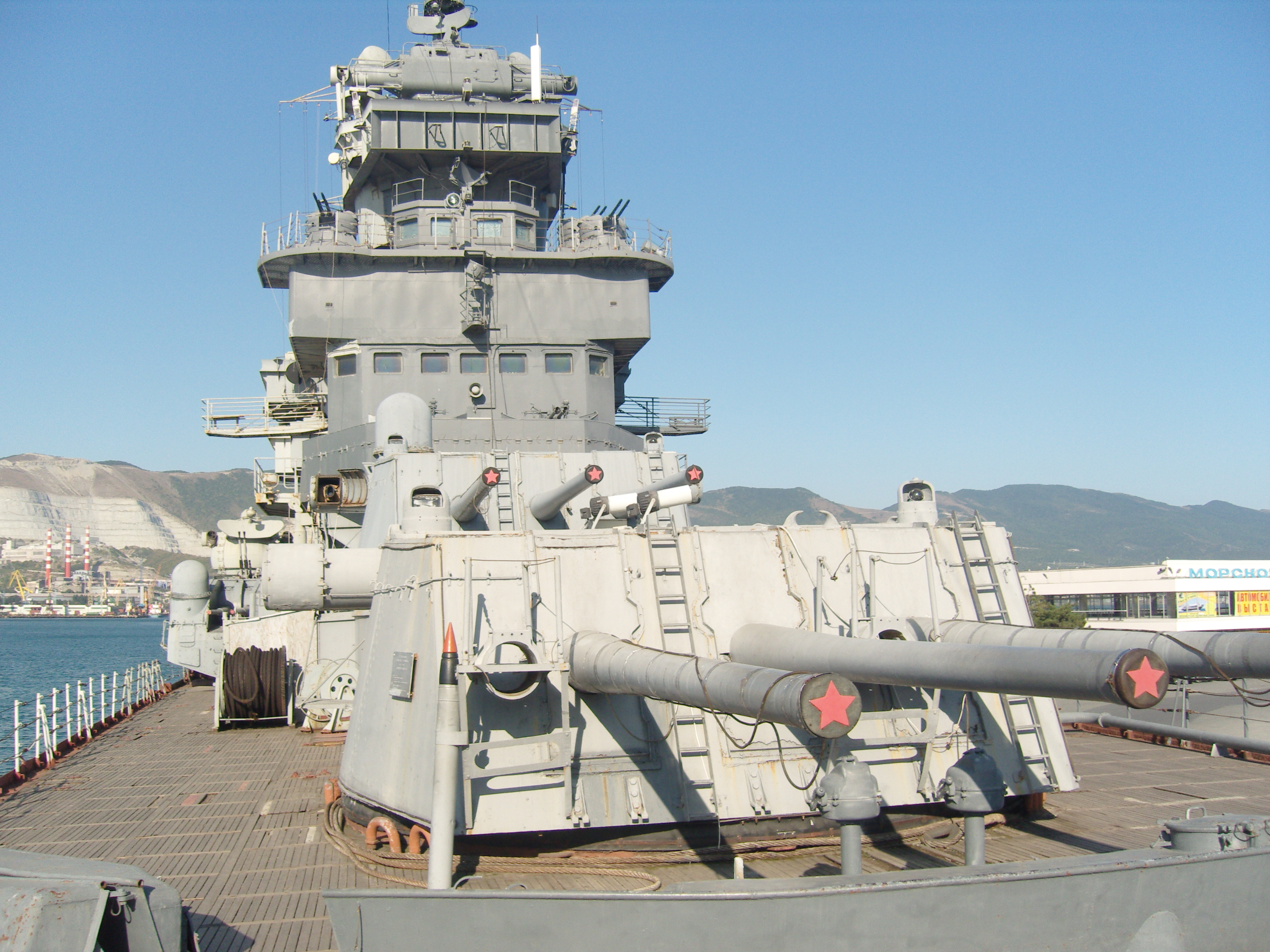 1-я и 2-я артиллерийские башни лёгкого крейсера «Михаил Кутузов»